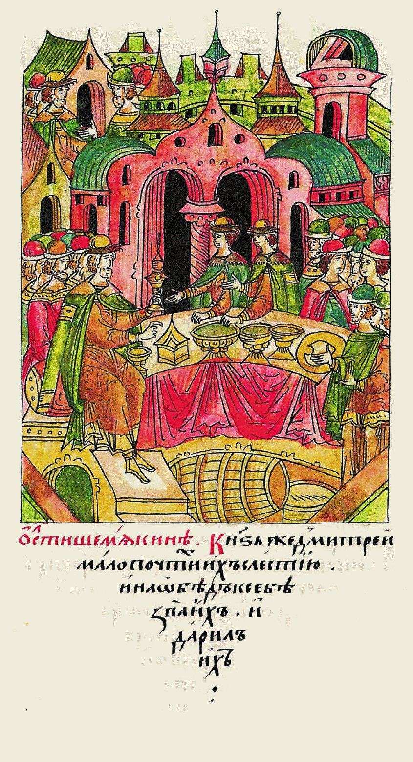 Лицевой летописный свод. Шумиловский том, л. 681: О коварстве Шемяки. Князь же Дмитрий немного почтил их с лестью, на обед к себе позвал и одарил их.